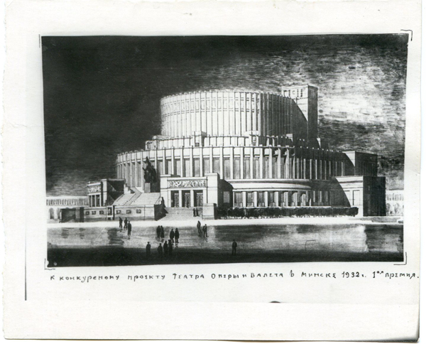 Театр оперы и балета в Минске. Проект. Общий вид. Конкурсный проект. 1-ая премия